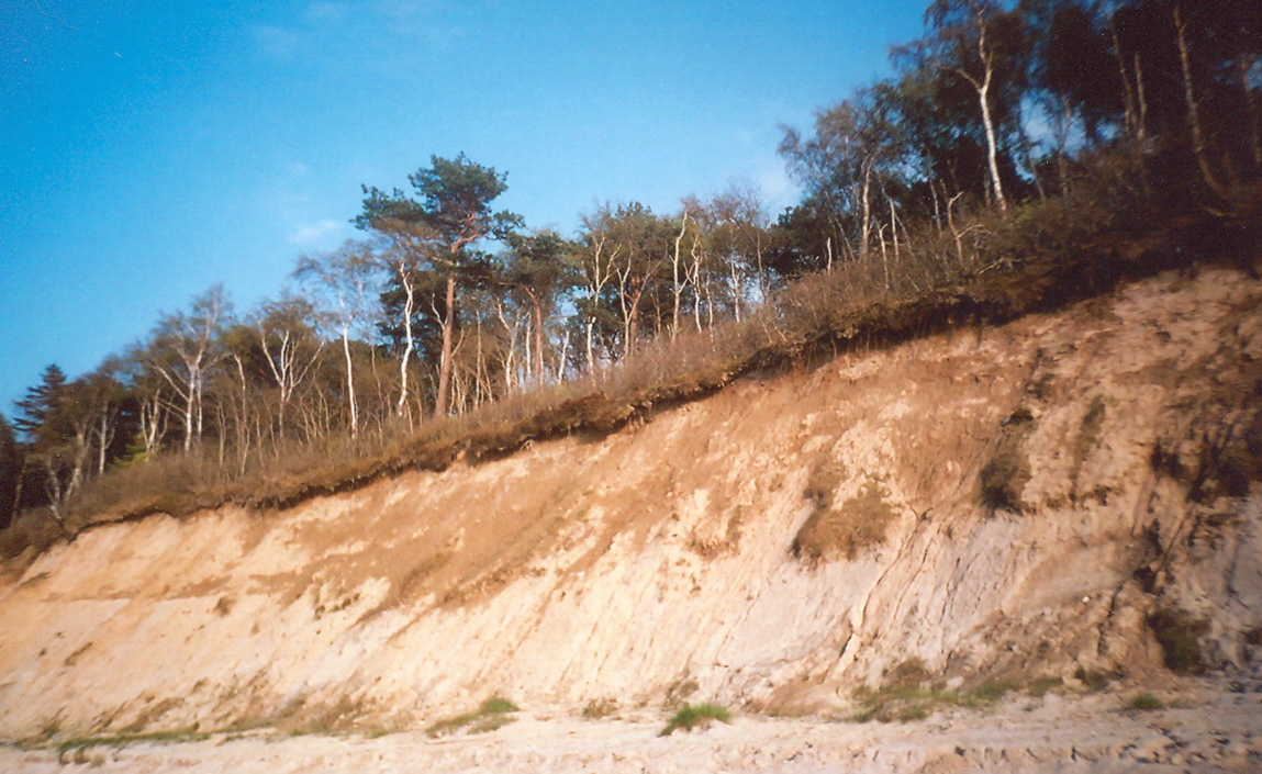 Klif w okolicach Niechorza